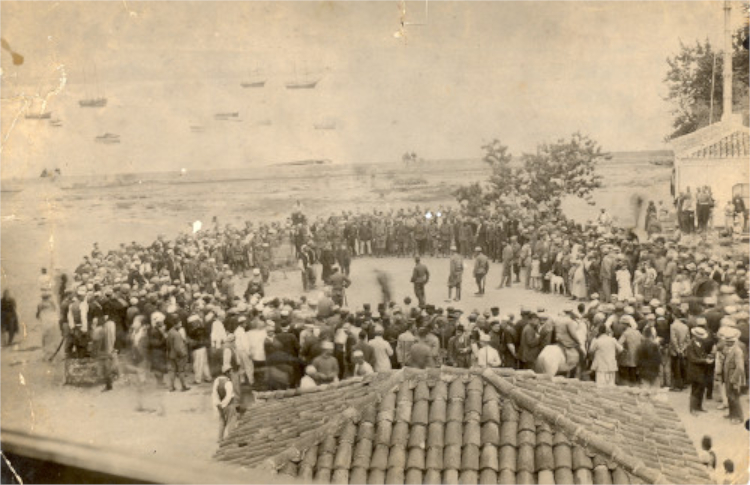 Gjyqi i Haxhi Qamilit